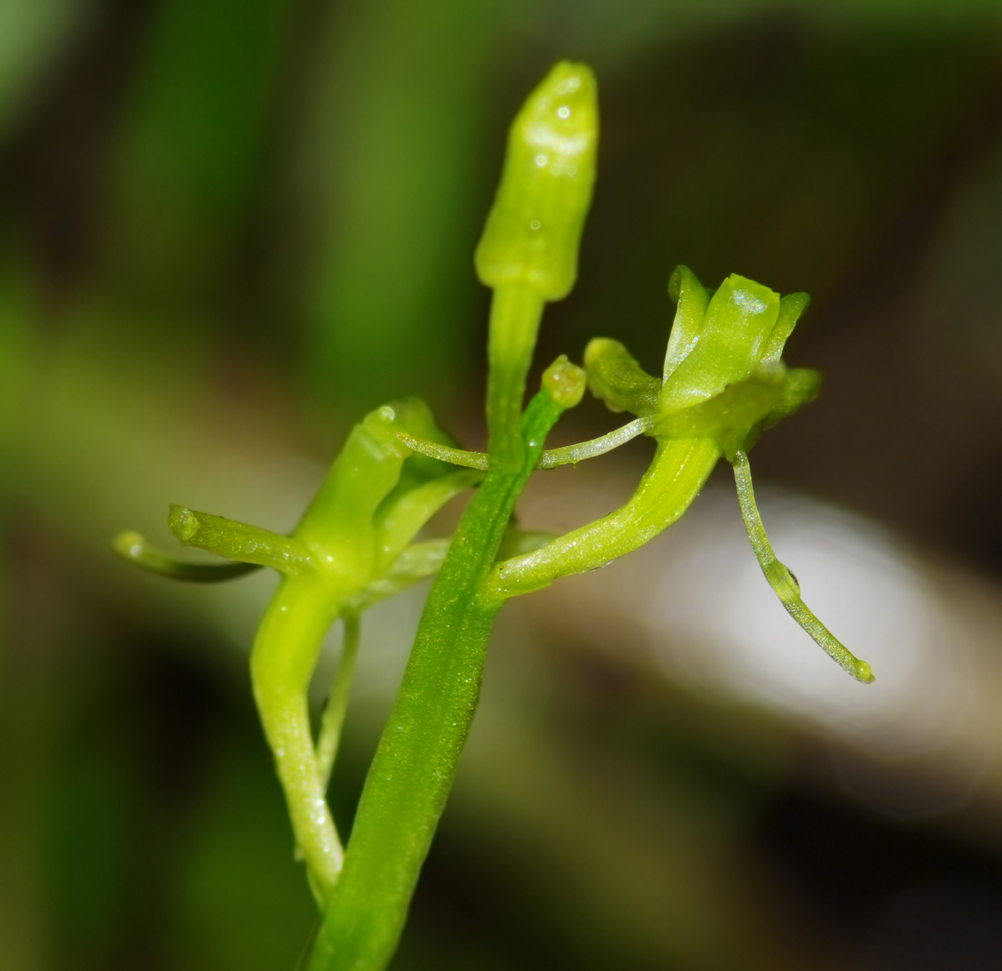 Lipiennik Loesela (Liparis loeselii) / Kuźnica Warężyńska w Dąbrowie Górniczej - wysięki